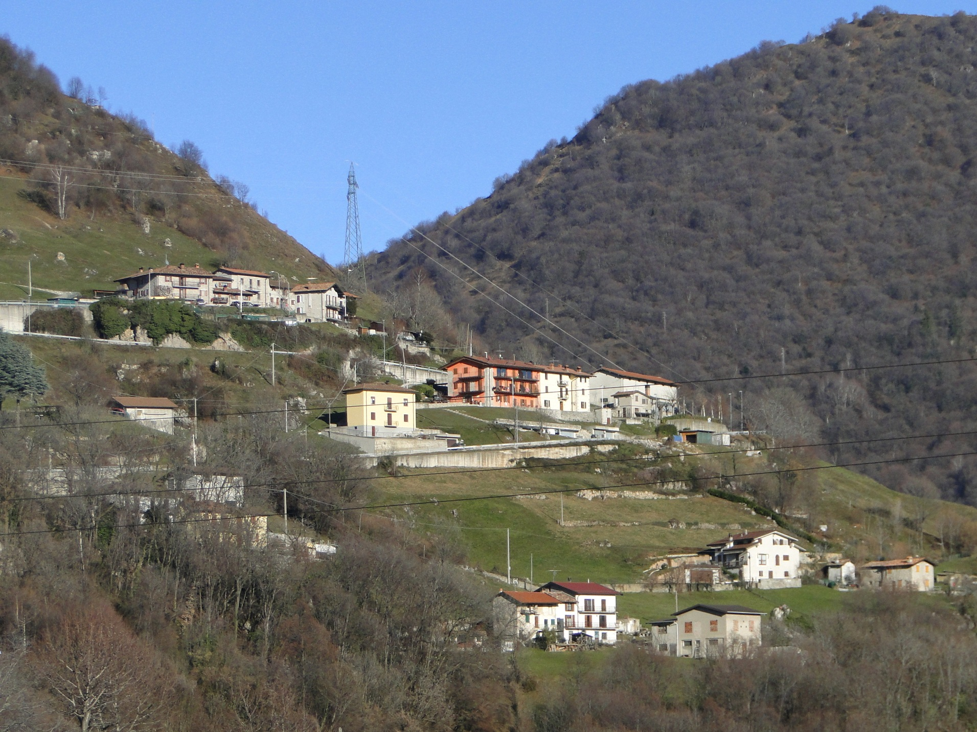 Monte di Nese, fraz. di Alzano Lombardo (BG). Località "Castello"